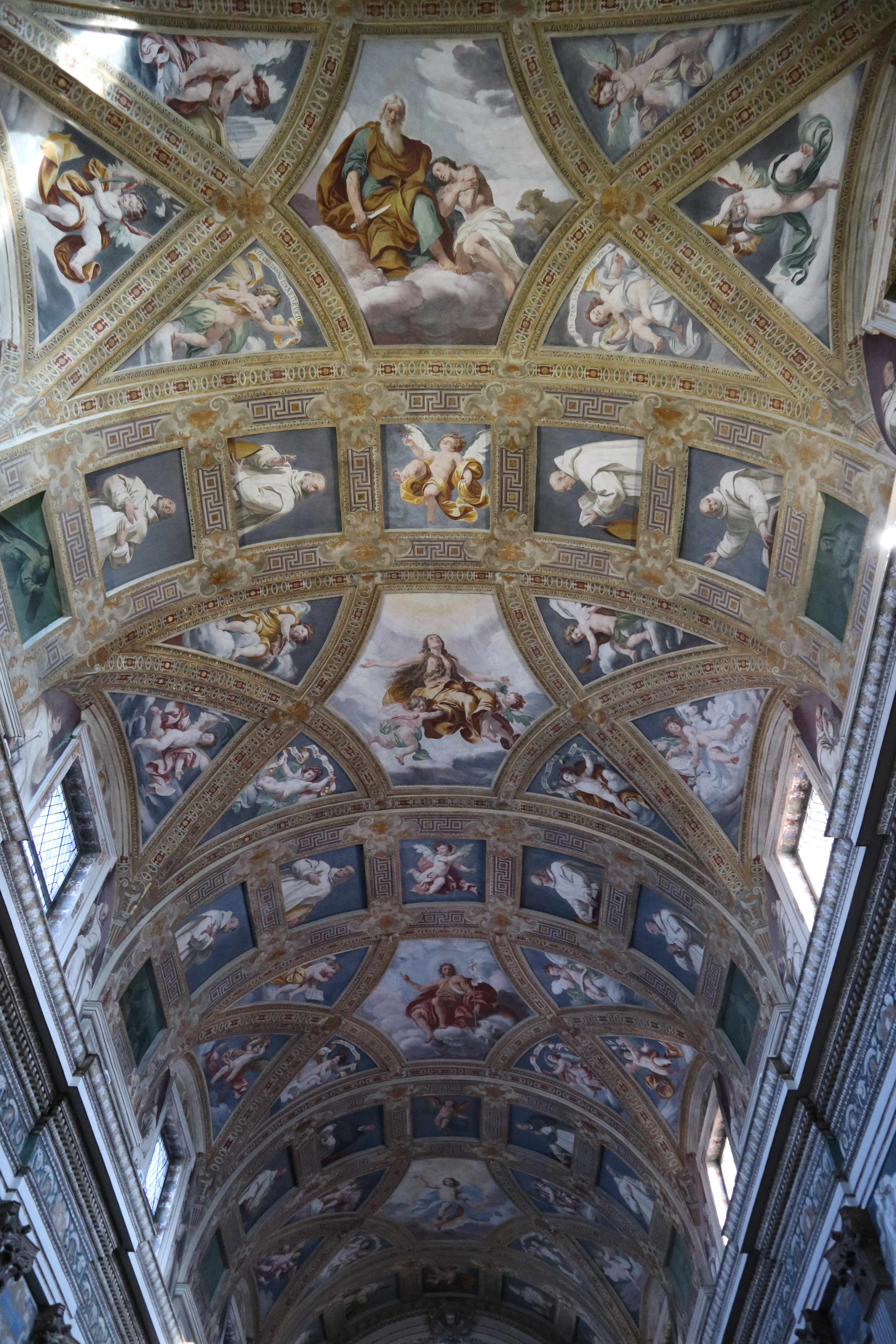 La volta affrescata da Daniele Crespi